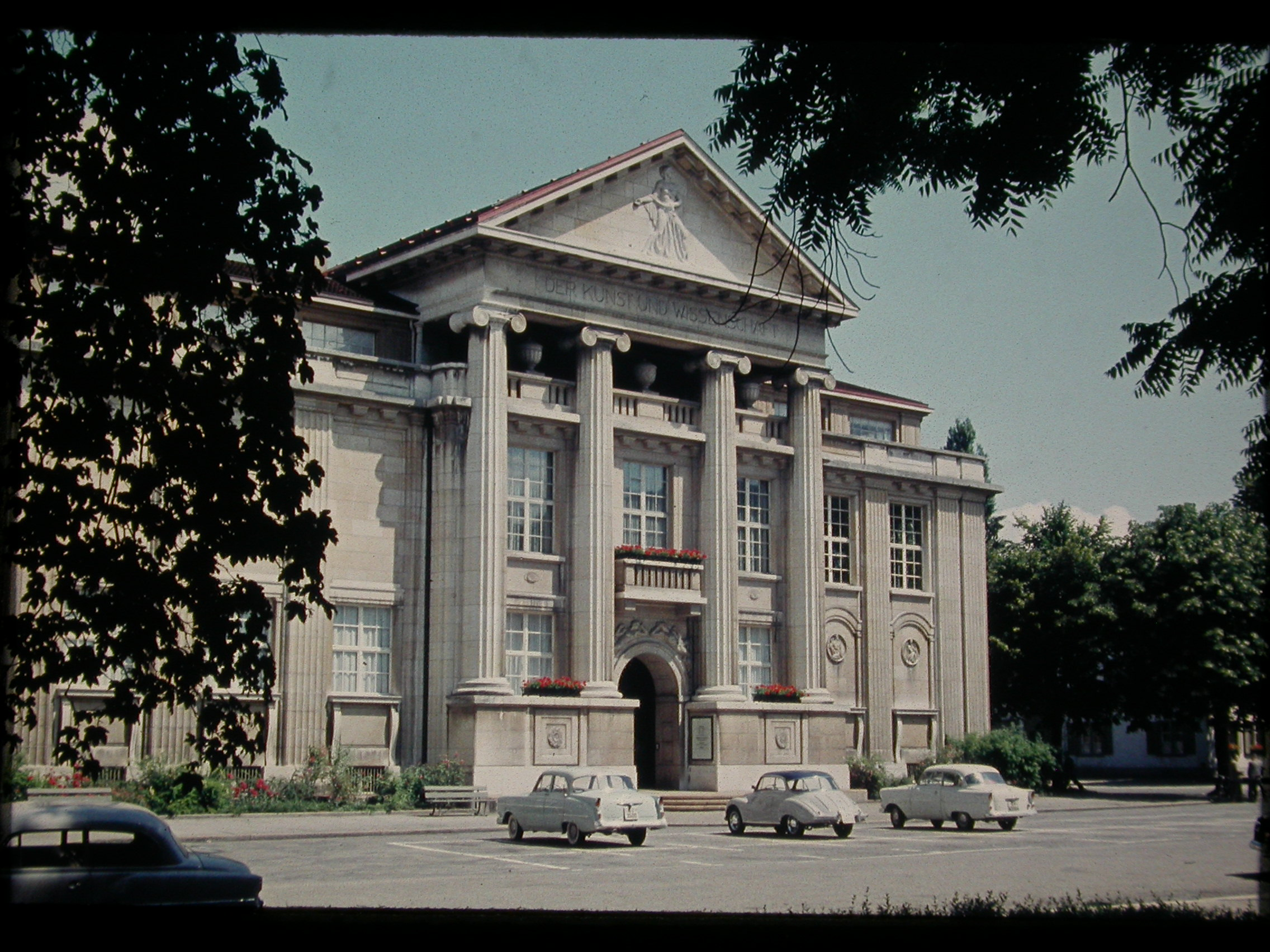 Kunstmuseum Winterthur